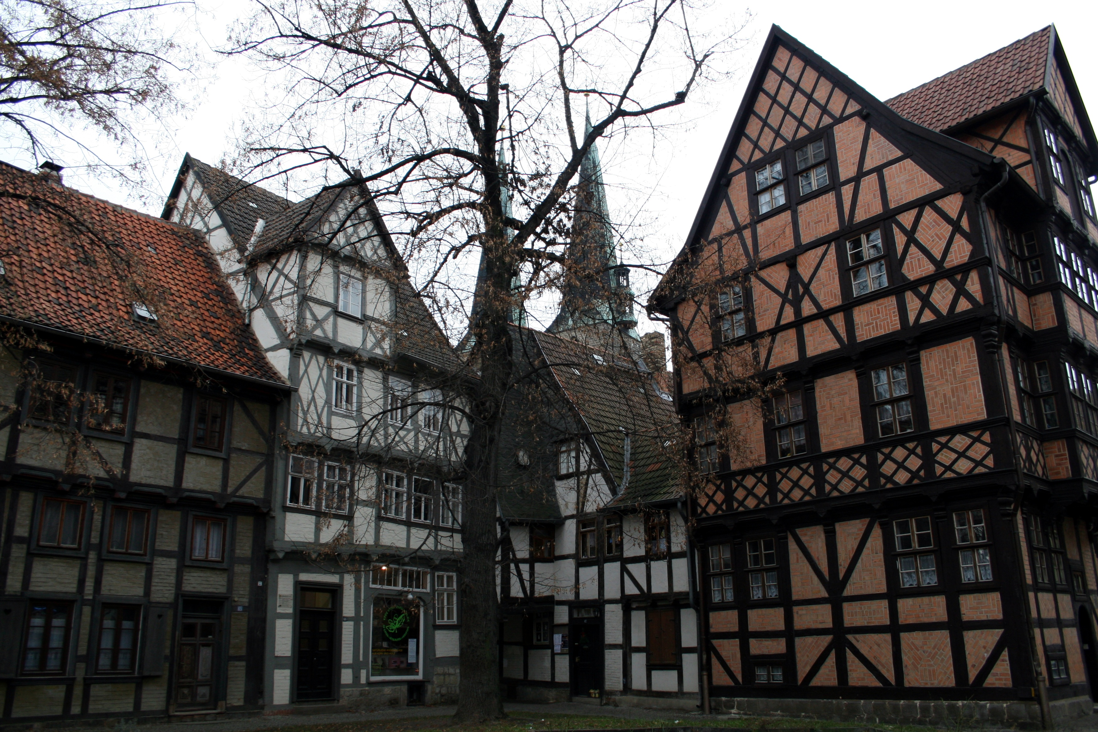 Fachwerkhäuser in Quedlinburg